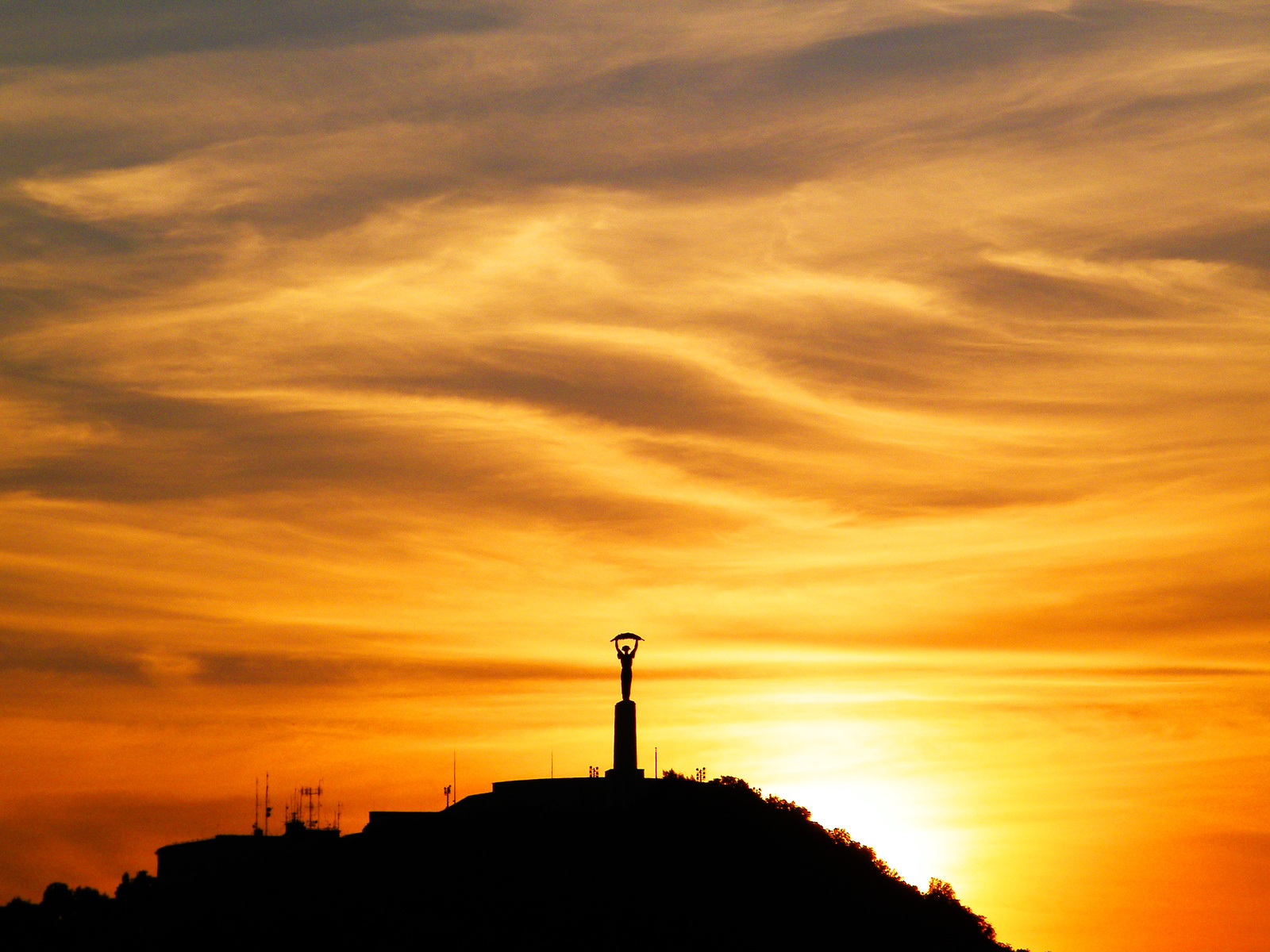 Citadella (Budapest 11, Gellért-hegy) This is a photo of a monument in Hungary. Identifier: 1119